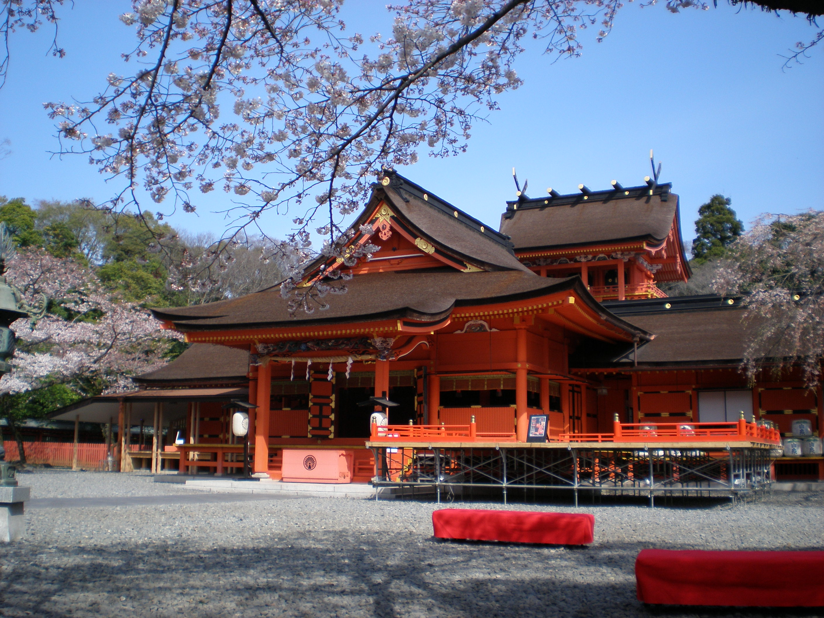 Honden of Fujisan Hongu Sengen Taisha, in Fujinomiya, Shizuoka, Japan